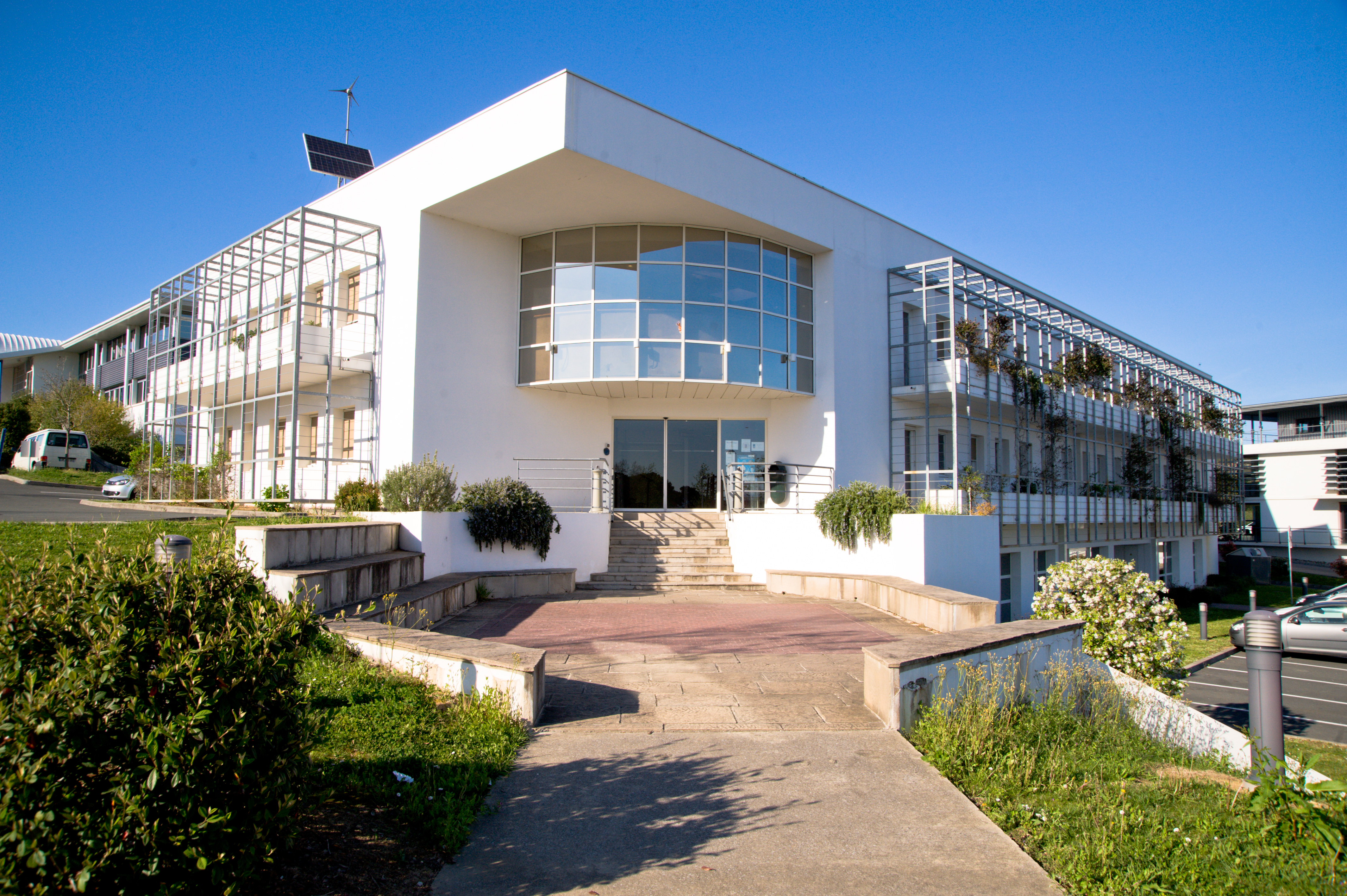 General view of ESTIA 2.